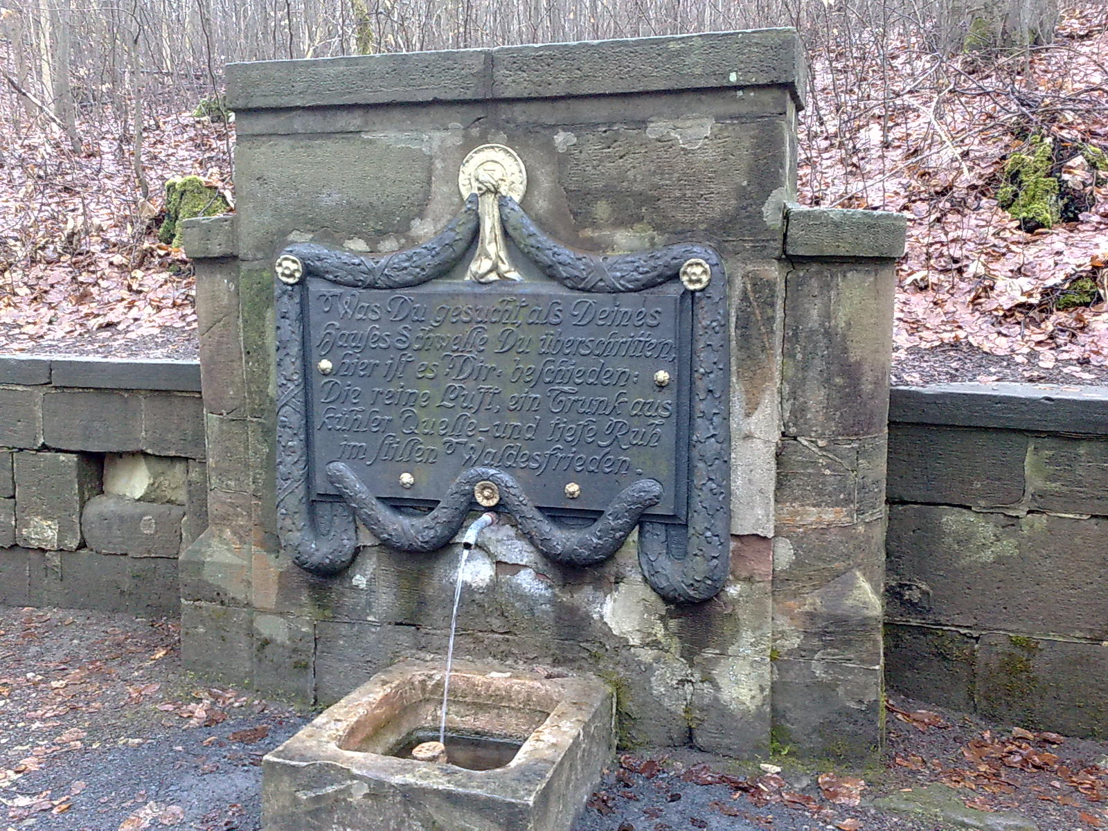 Inschrift am Herzogsbrunnen. Treffpunkt der Jagdgesselschaft Coburger Herzöge. Westlich der Lauterburg.